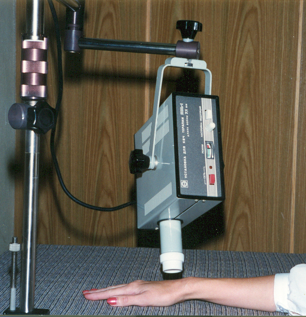 Аппарат для КВЧ терапии "Явь-1". Облучение лучезапястного сустава.